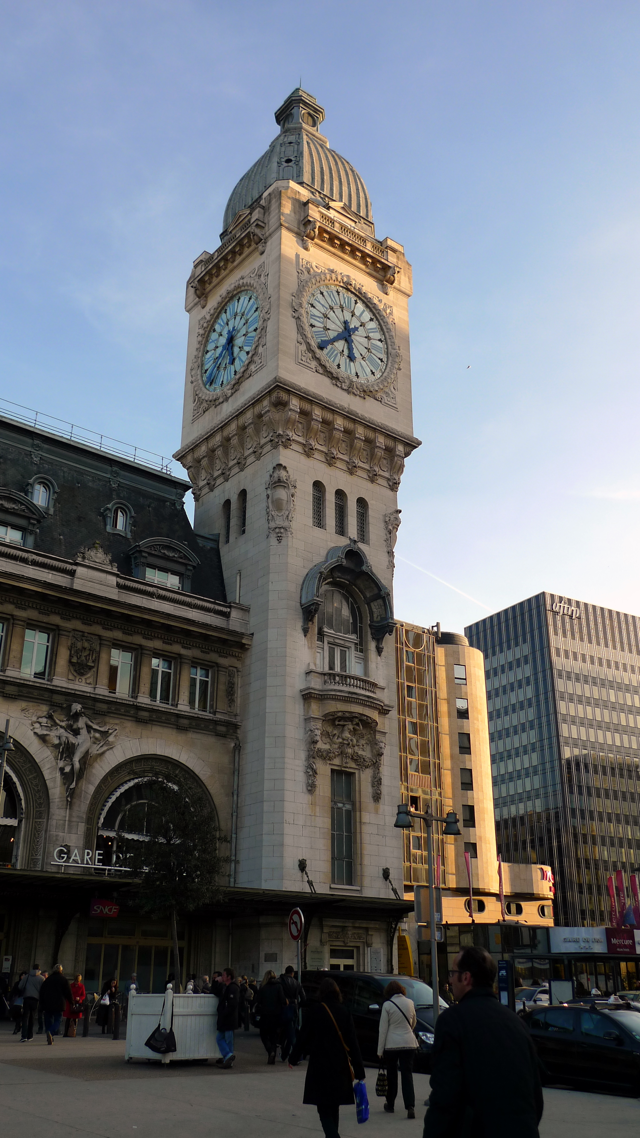 La tour de la gare de Lyon à Paris